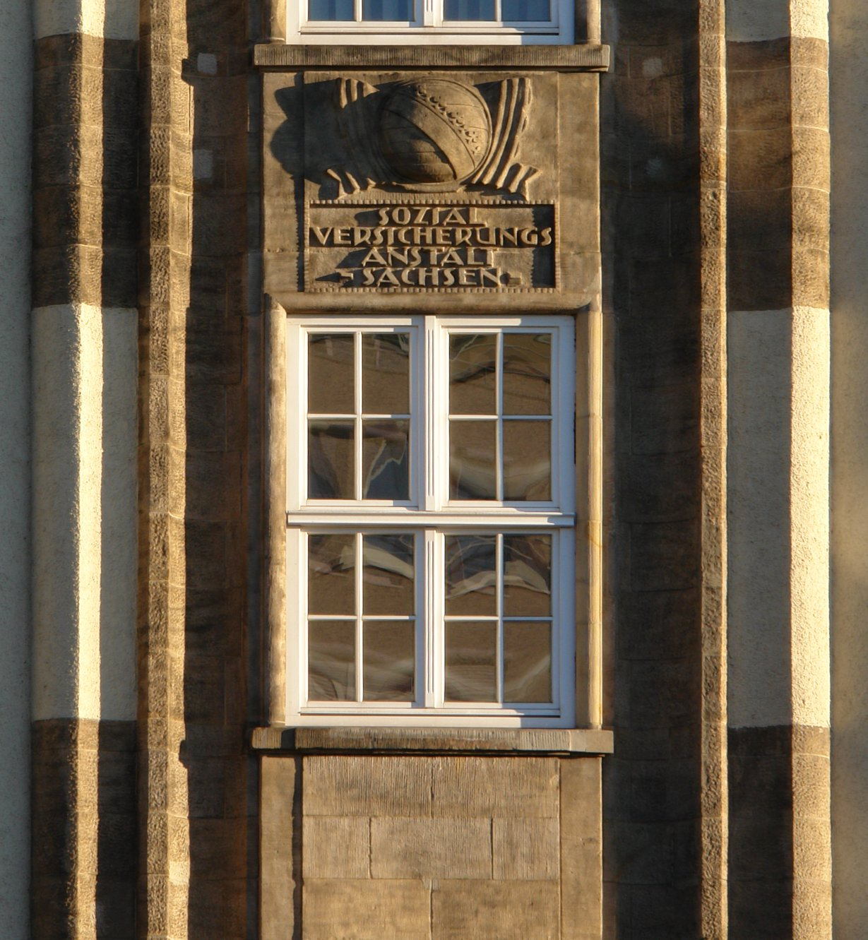 Gebäude der ehemaligen Sozialversicherungsanstalt Sachsen in Dresden-Johannstadt, Detail der Gebäude-Ecke Dürerstraße / Eliasstraße; erbaut um 1922 nach Entwurf des Dresdener Architekturbüros Schilling und Graebner